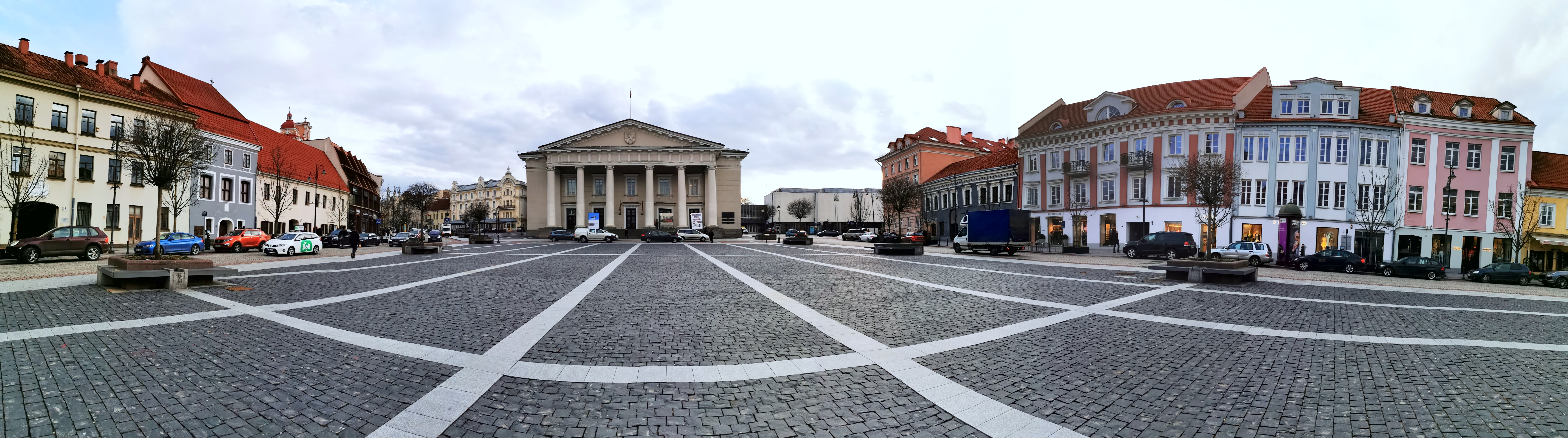 Vilniaus rotušės panorama